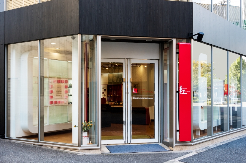 2018年撮影